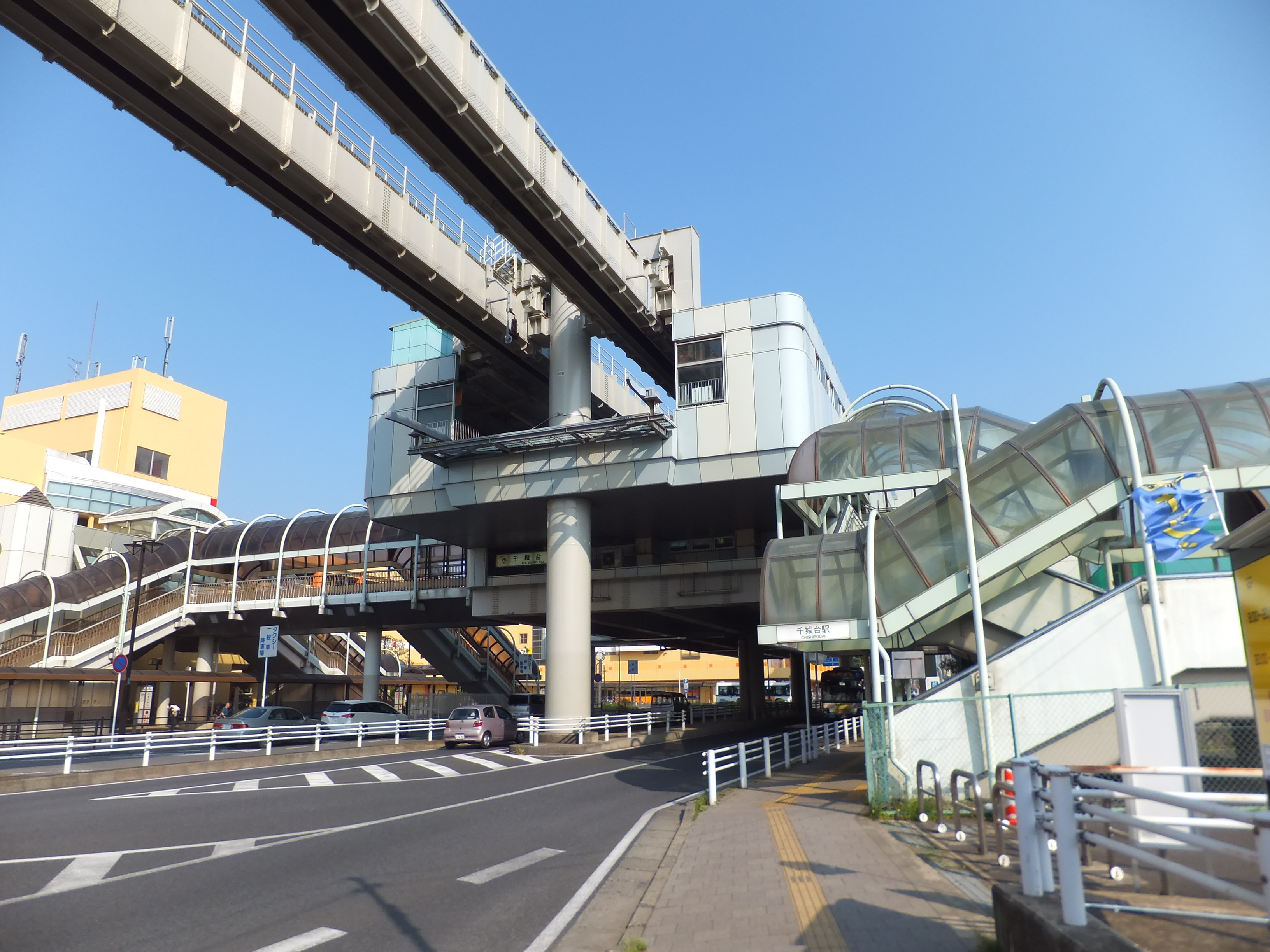 千葉都市モノレール千城台駅